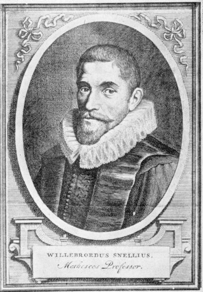 Willibrord Snellius